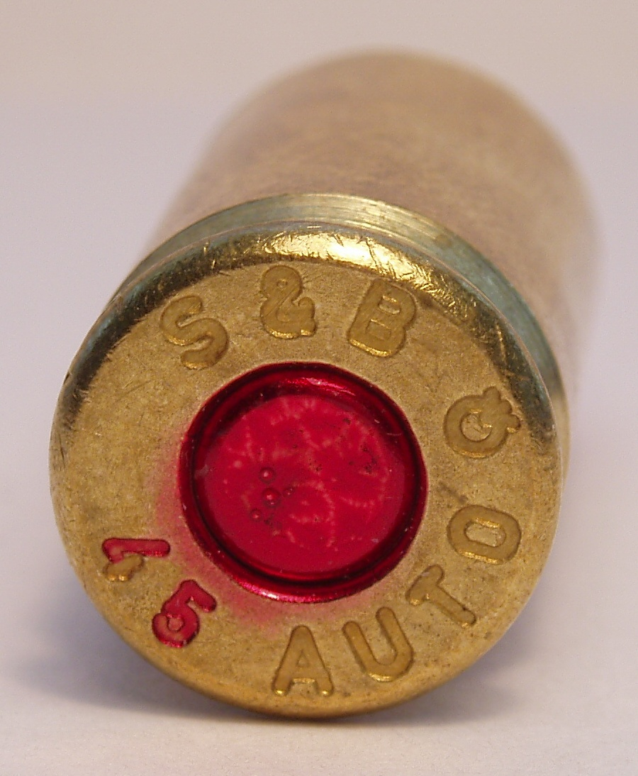 45 ACP pistol cartrdige. FMJ bullet. Manufacturer: Sellier & Bellot.